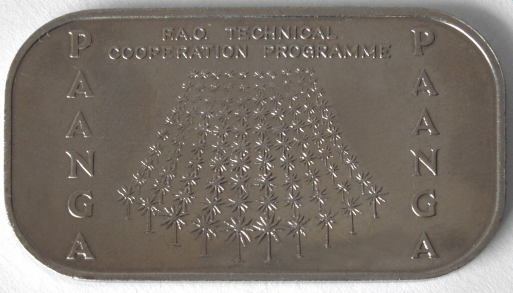 Tonga, 1 Pa'anga, 1979, back, 27 x 42 mm, cu/ni